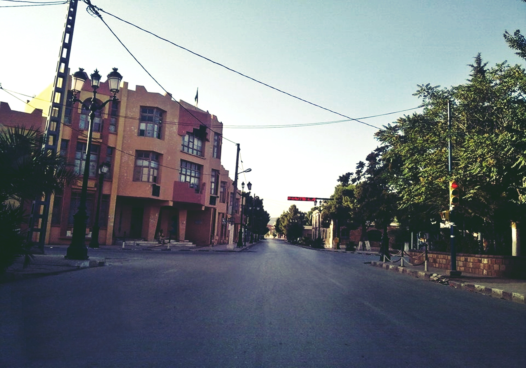 Boulevard El Bayadh centre ville